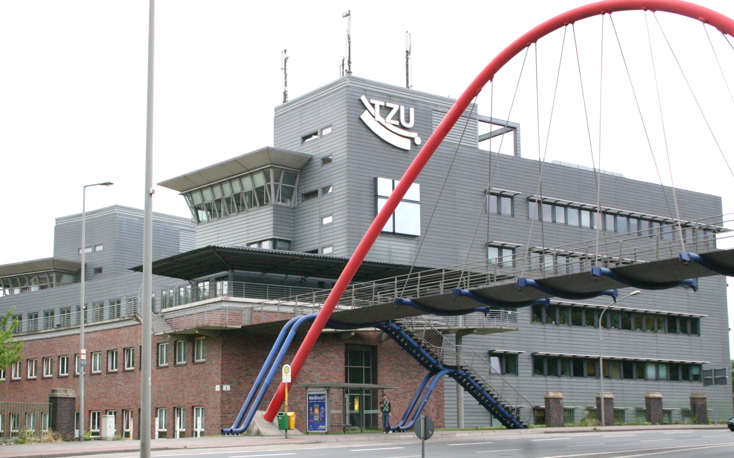 Technologiezentrum Umweltschutz (TZU) in Oberhausen. Neubau TZU IV mit Fußgängerbrücke über die Mülheimer Straße